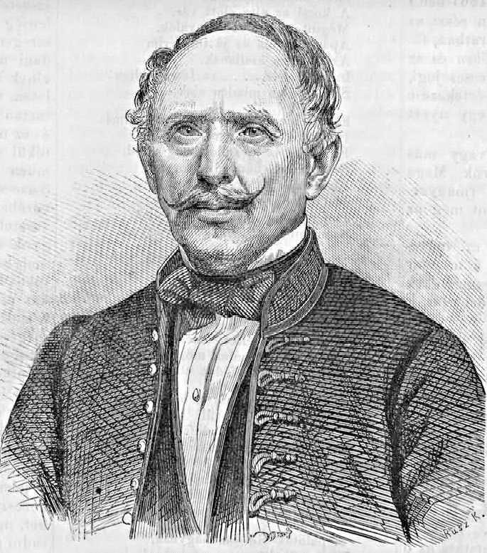 Fogarasi János (1801–1878) nyelvtudós, jogász, zeneszerző, néprajzkutató, a Magyar Tudományos Akadémia tagja. Rusz Károly metszete. (Vasárnapi Ujság, 1864. november 20.)